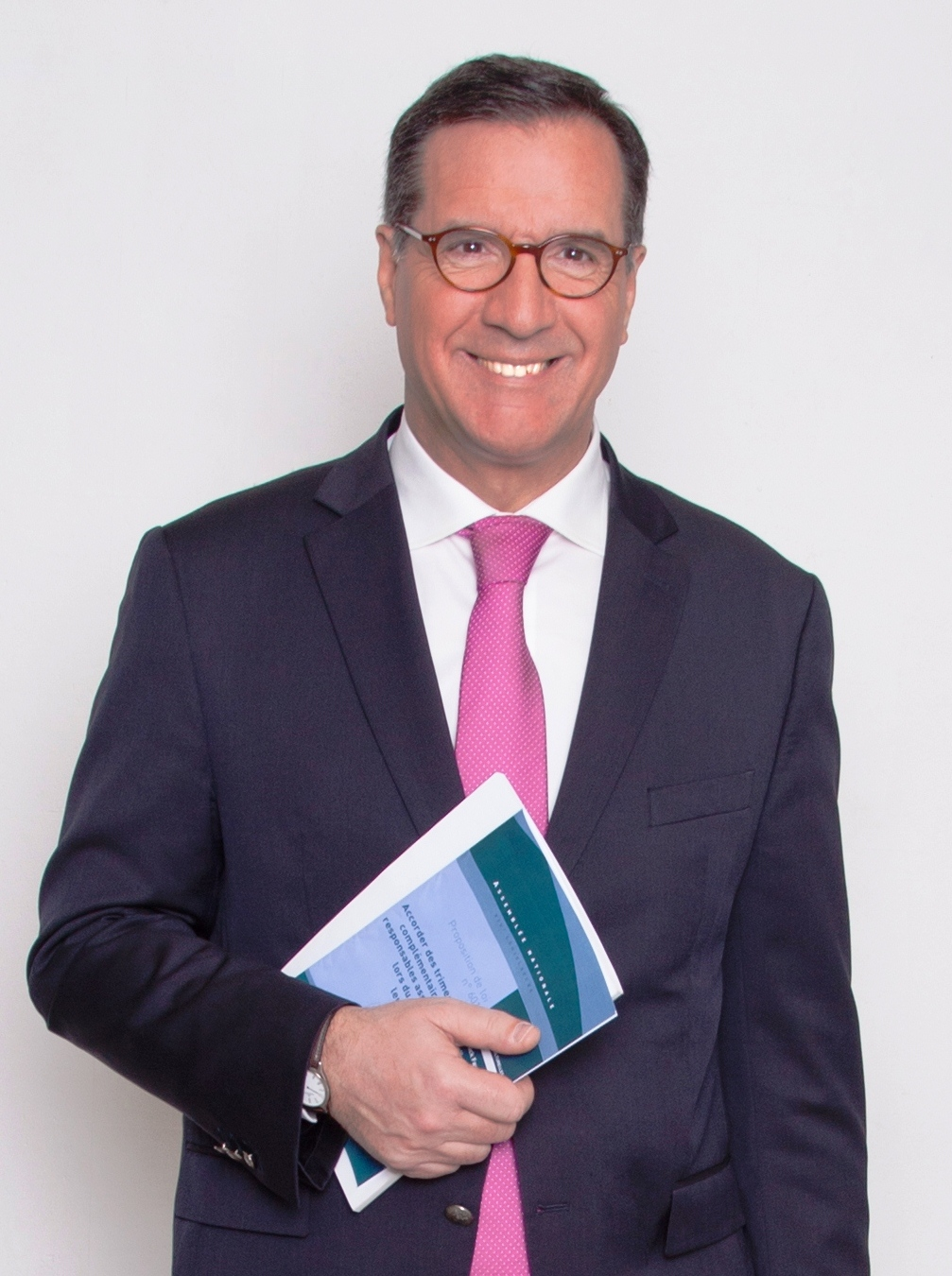 Yannick FAVENNEC député UDI de la 3ème circonscription de la Mayenne.